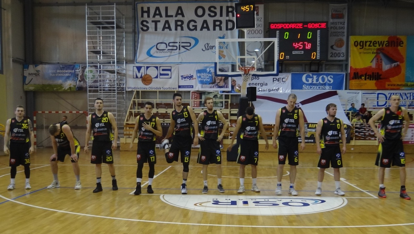 Sokół Łańcut w finale ze Spójnią (12.05.2018)